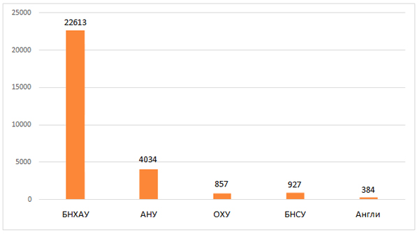 Монгол: Халдагчдын байдал